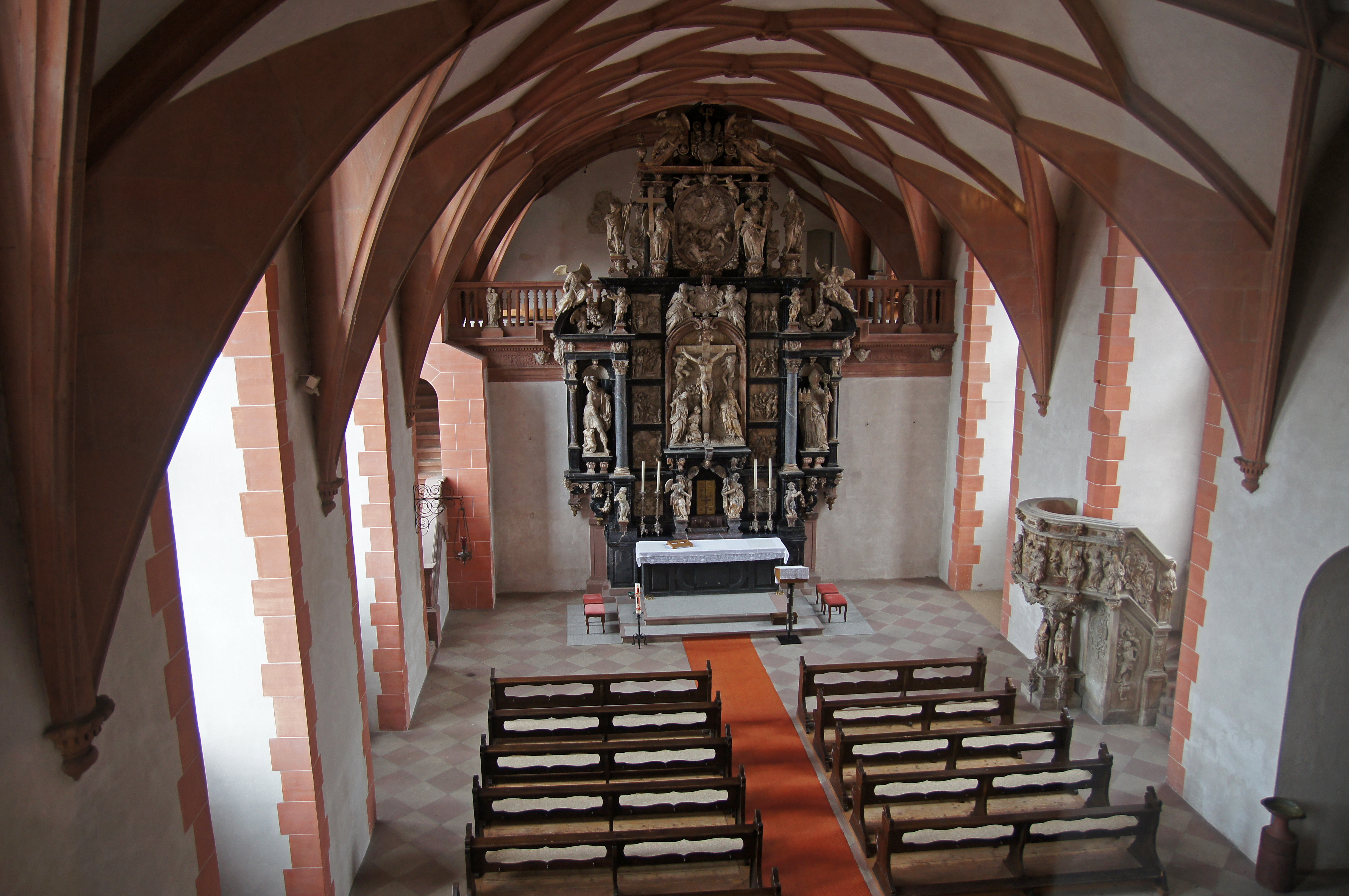 2011-03-26 Aschaffenburg 040 Schloss Johannisburg, Schlosskapelle